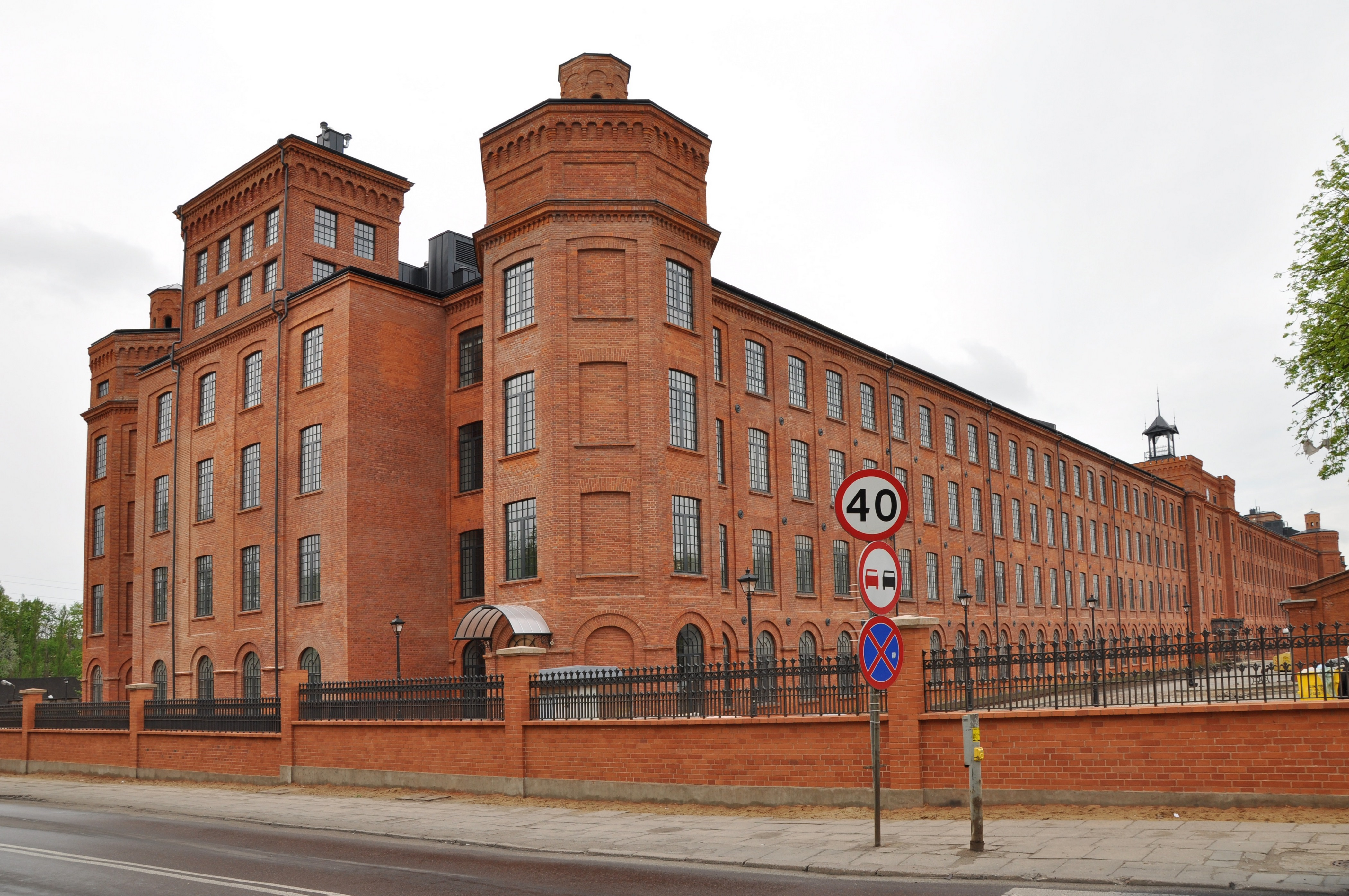 Fabryka Scheiblera w Łodzi od ul. Tymienieckiego